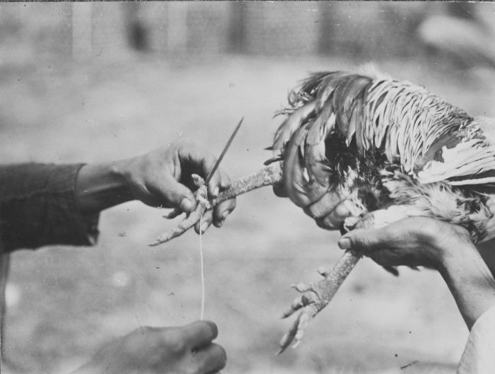 foto. Het vastmaken van een hanengevechtmes aan de poot van een haan op Bali